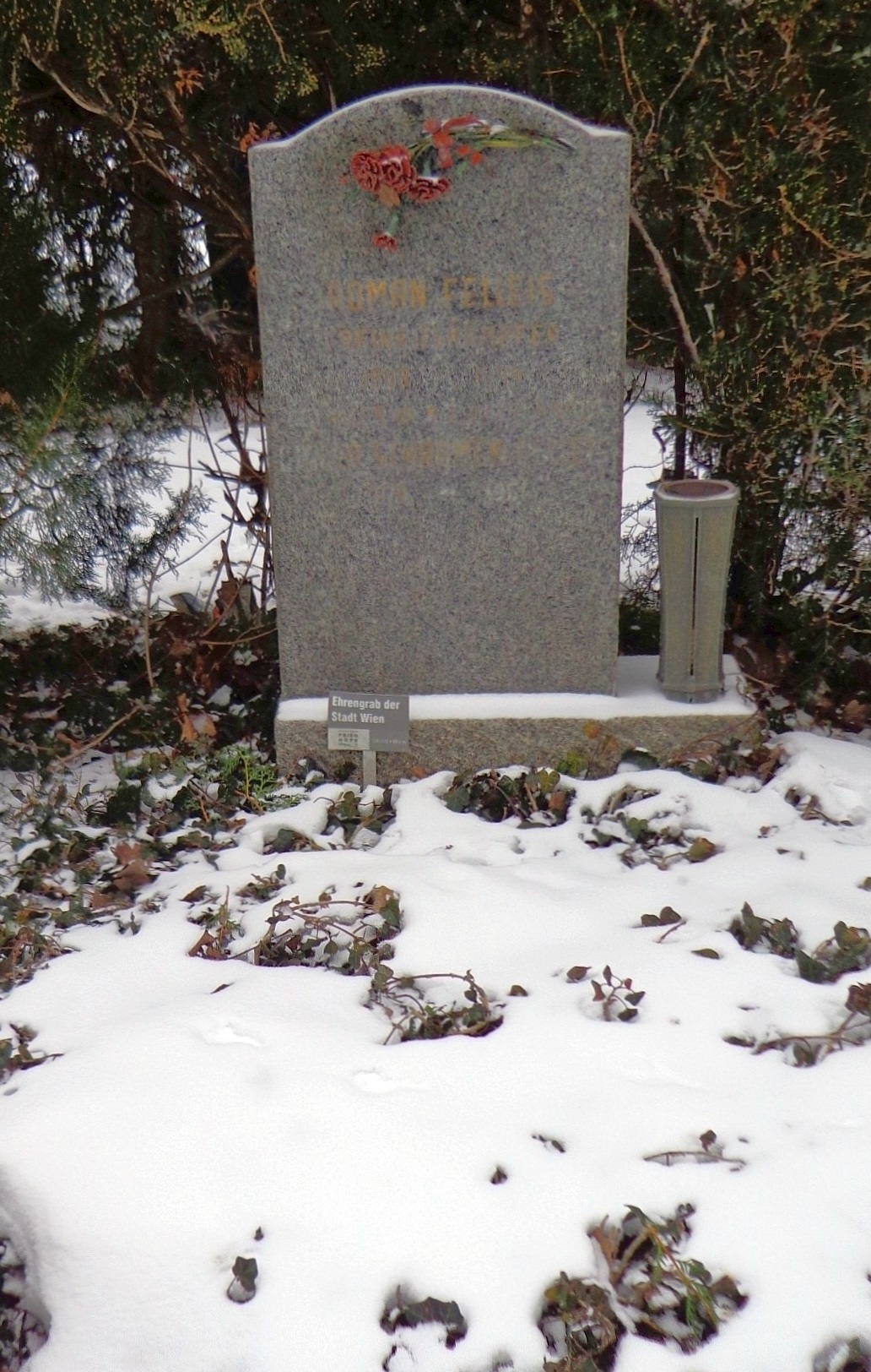 Feuerhalle Simmering - Urnenhain, ehrenhalber gewidmetes Urnengrab des Politikers und Freiheitskämpfers Roman Felleis (Abteilung 2, Ring 3, Gruppe 1, Nummer 18).